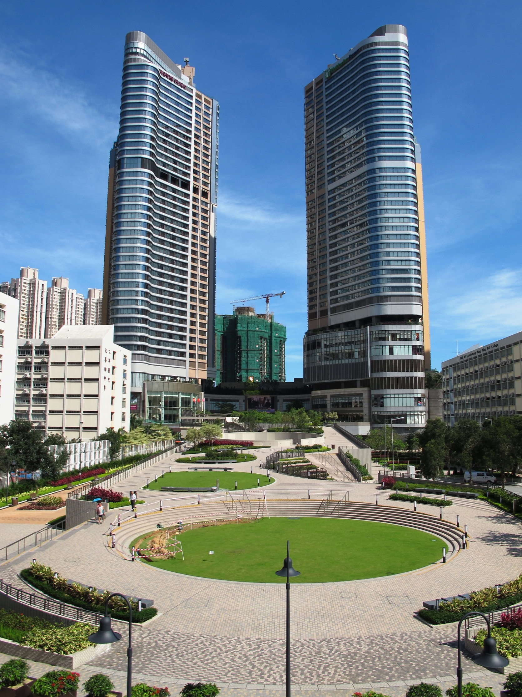 Tsang Kwan O The Wings